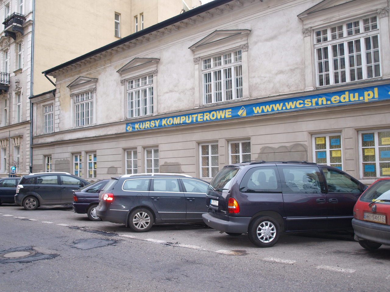 dom Kraszewskiego przy ulicy Mokotowskiej 48